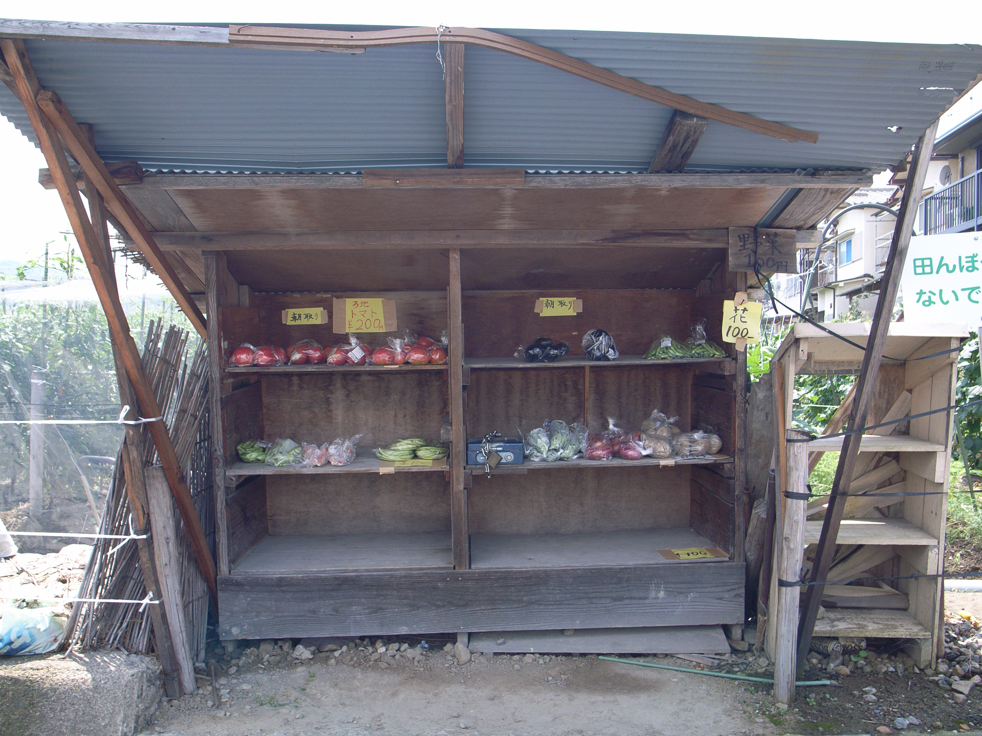 Unattended vending stall